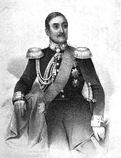 Генерал-адъютант Колзаков Павел Андреевич